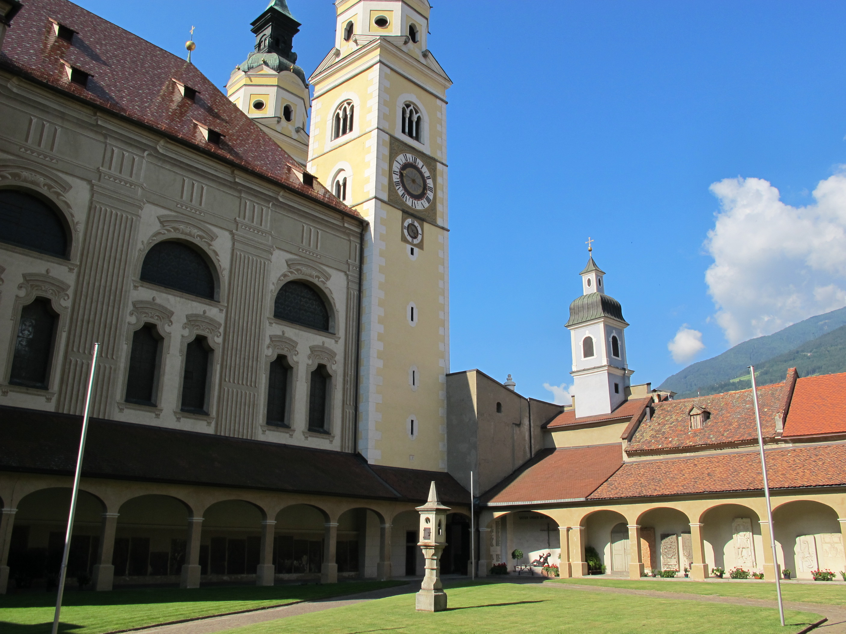 Brixen, Alter Friedhof; links die Nordfassade des Brixner Doms